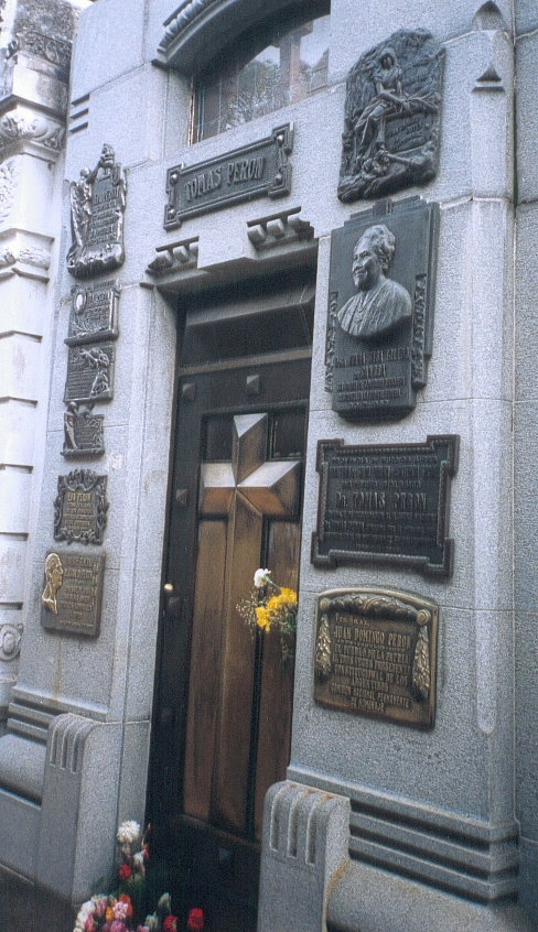 Auteur de la photographie : FC Georgio Sujet : Tombe de Juan Peron Lieu : Cimetière central de Buenos Aires Année : 1992